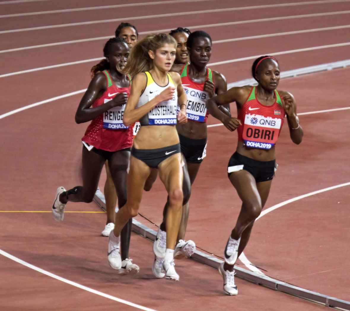 DOH80469 5000m women klosterhalfen obiri